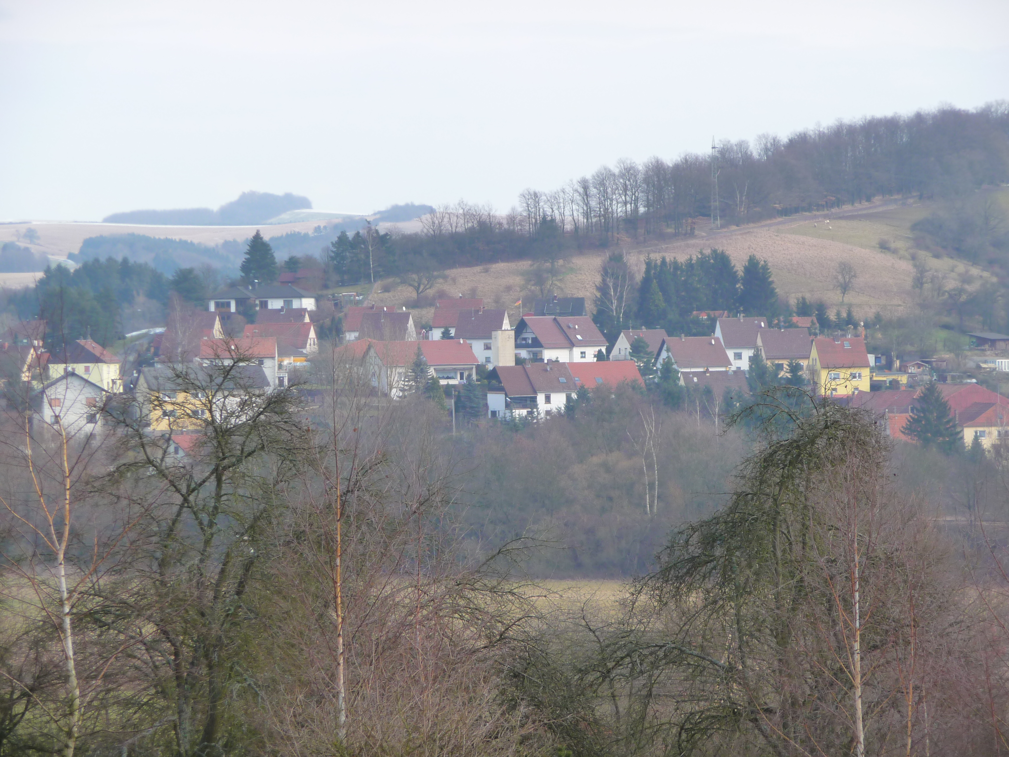 Blick auf Ulmet (Landkreis Kusel, Deutschland)